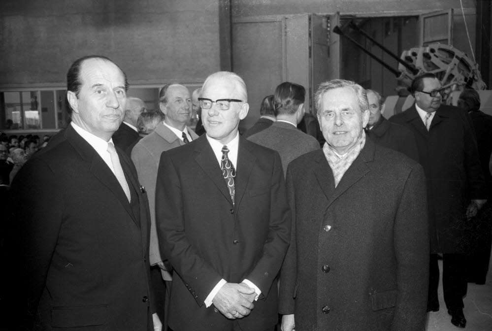 Diplomingenieur Karl Heinz Kurzak (Bildmitte) geht in den Ruhestand, Diplomingenieur Werner Kalähne (rechts) übernimmt geschäftsführend die Direktion. Links der Präsident des Bundesamtes für Wehrtechnik und Beschaffung, Generalleutnant a. D. Dietrich Willikens.